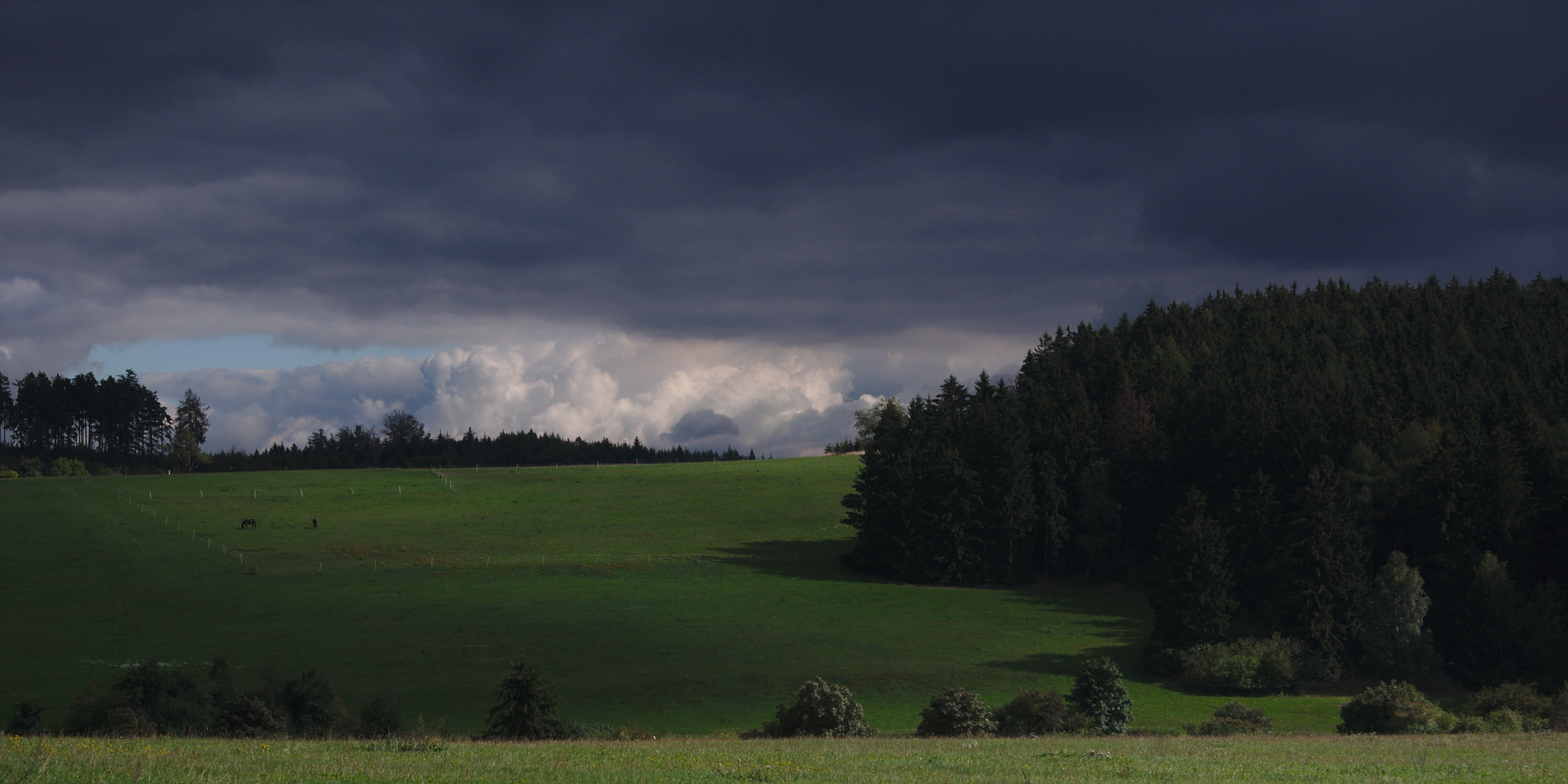 Chov koní, Bedřichov, okres Blansko